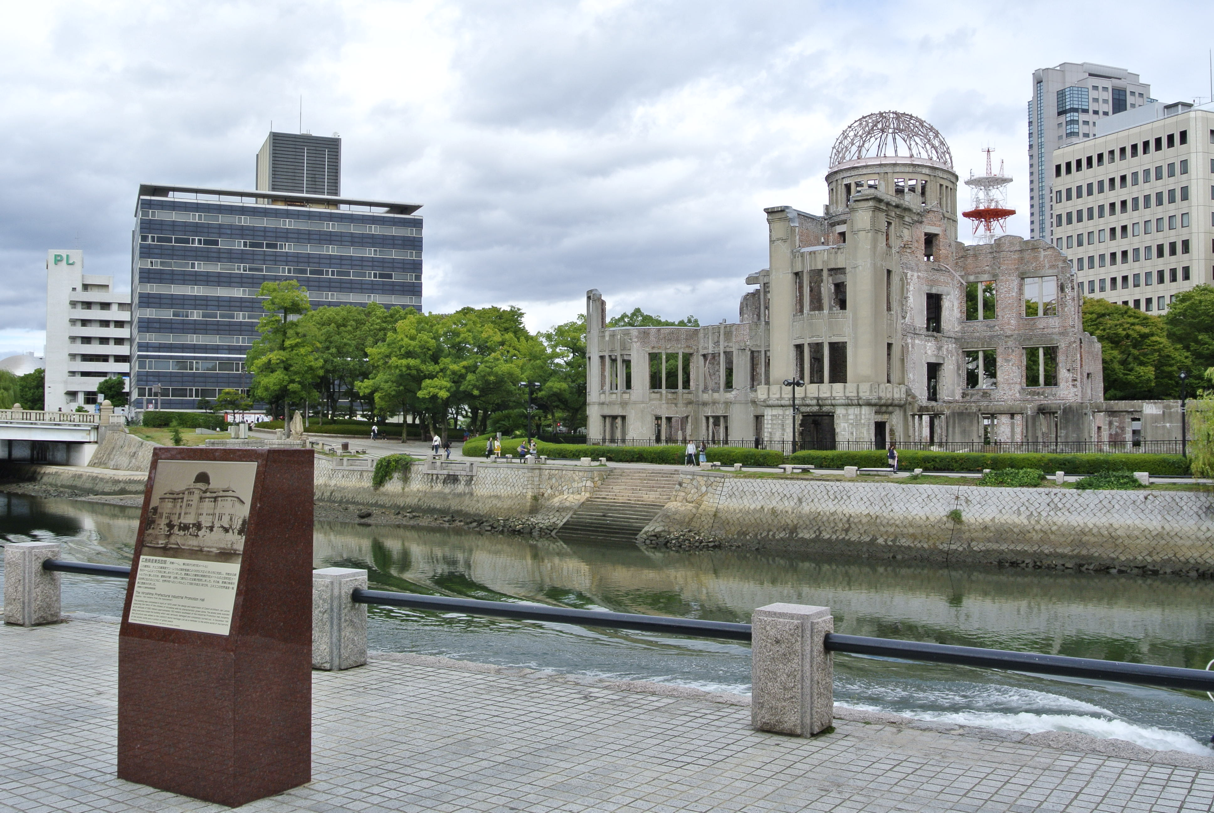 原爆ドーム